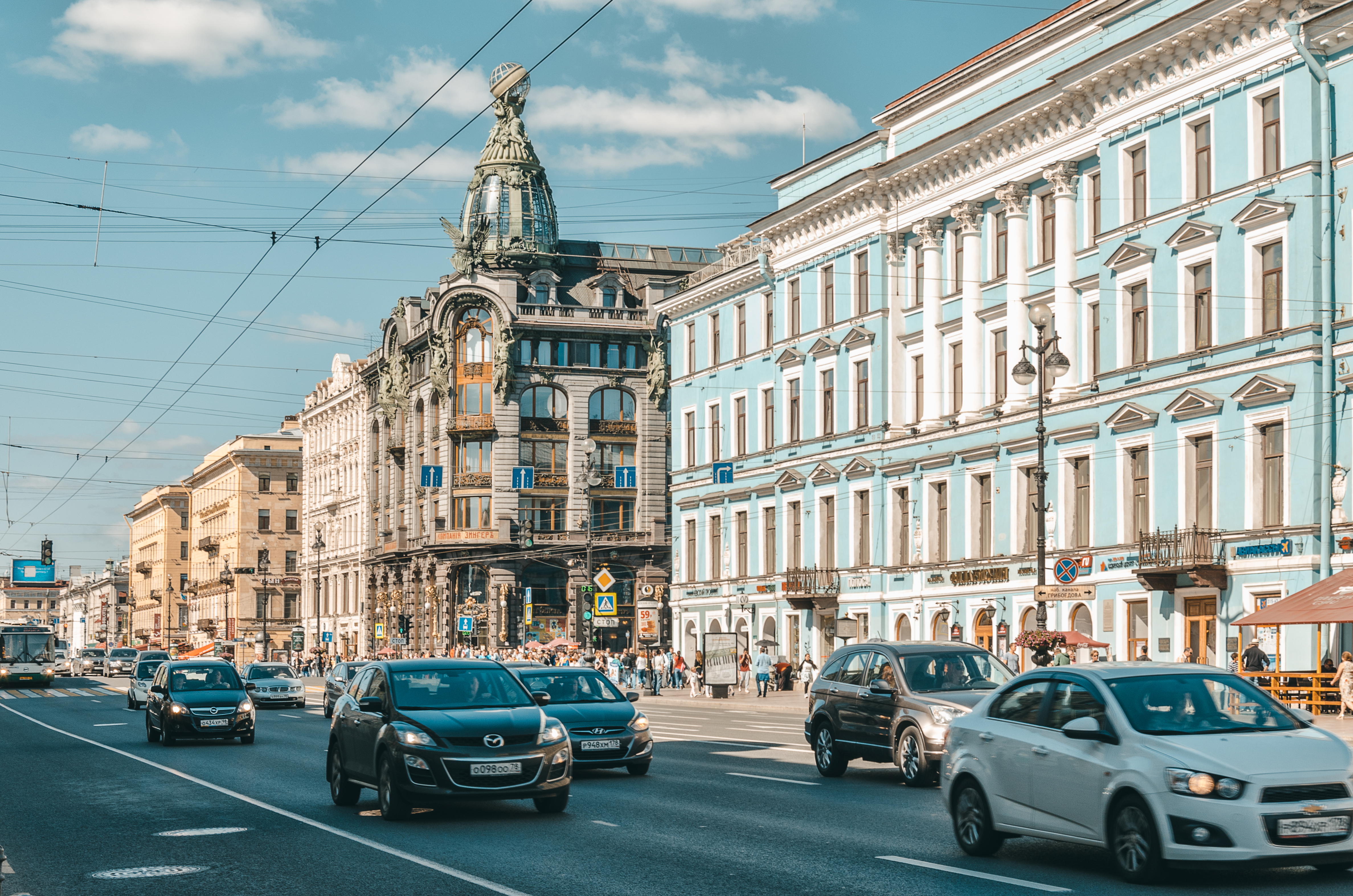 Невский проспект: Невский проспект, Центральный район, Санкт-Петербург